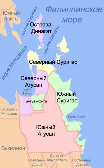 Карта провинций региона Карага (Филиппины)